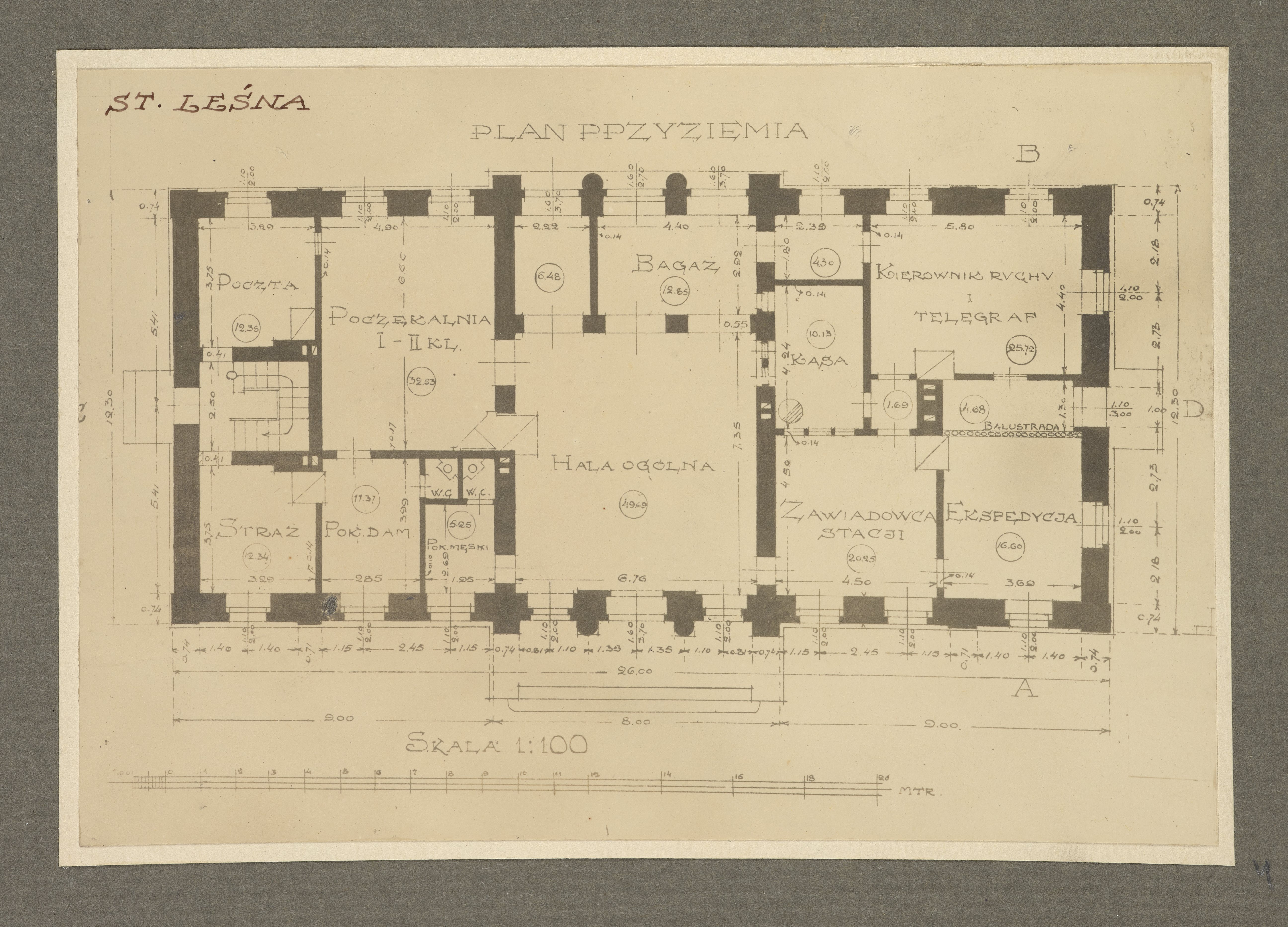 Беларуская (тарашкевіца): Лясная (Lasnaja). Чыгуначная станцыя